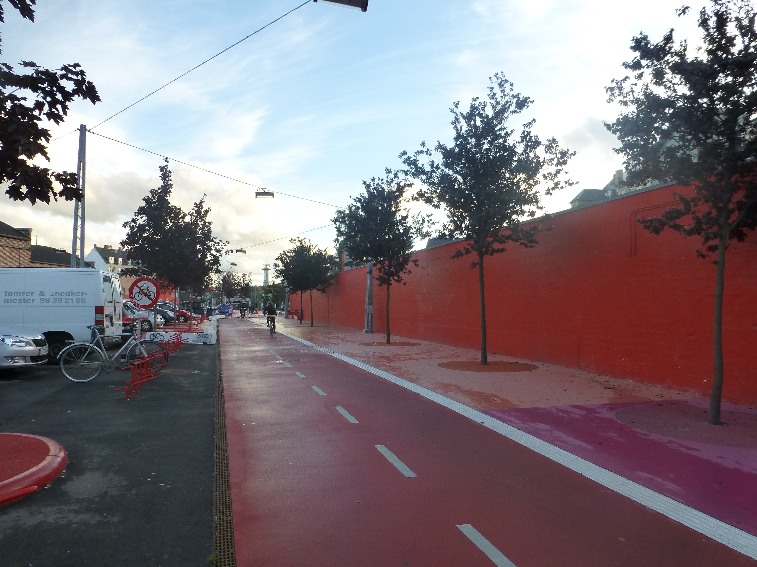 The bikeway Nørrebroruten in Nørrebro in Copenhagen.